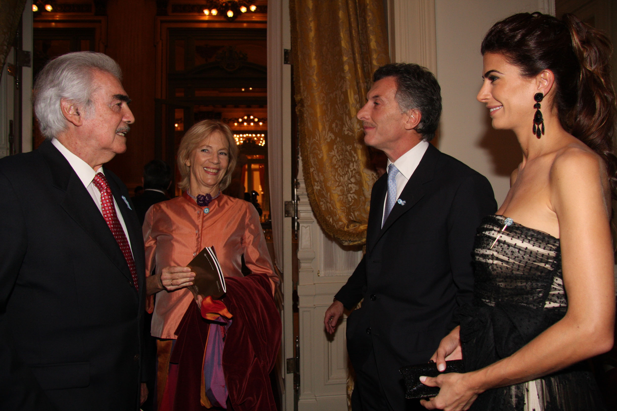 Gala de reapertura del Teatro Colón. Mauricio Macri, Juliana Awada y Enrique Olivera.